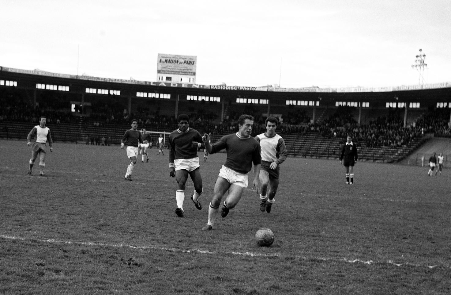 Stadium municipal de Toulouse, 1bis allées Gabriel-Biénès. 1er décembre 1963. L'équipe du Toulouse Football Club rencontre l'équipe de Nîmes. Cliché pris durant le match. Au 1er plan action de jeu ; en arrière-plan gradins avec spectateurs.